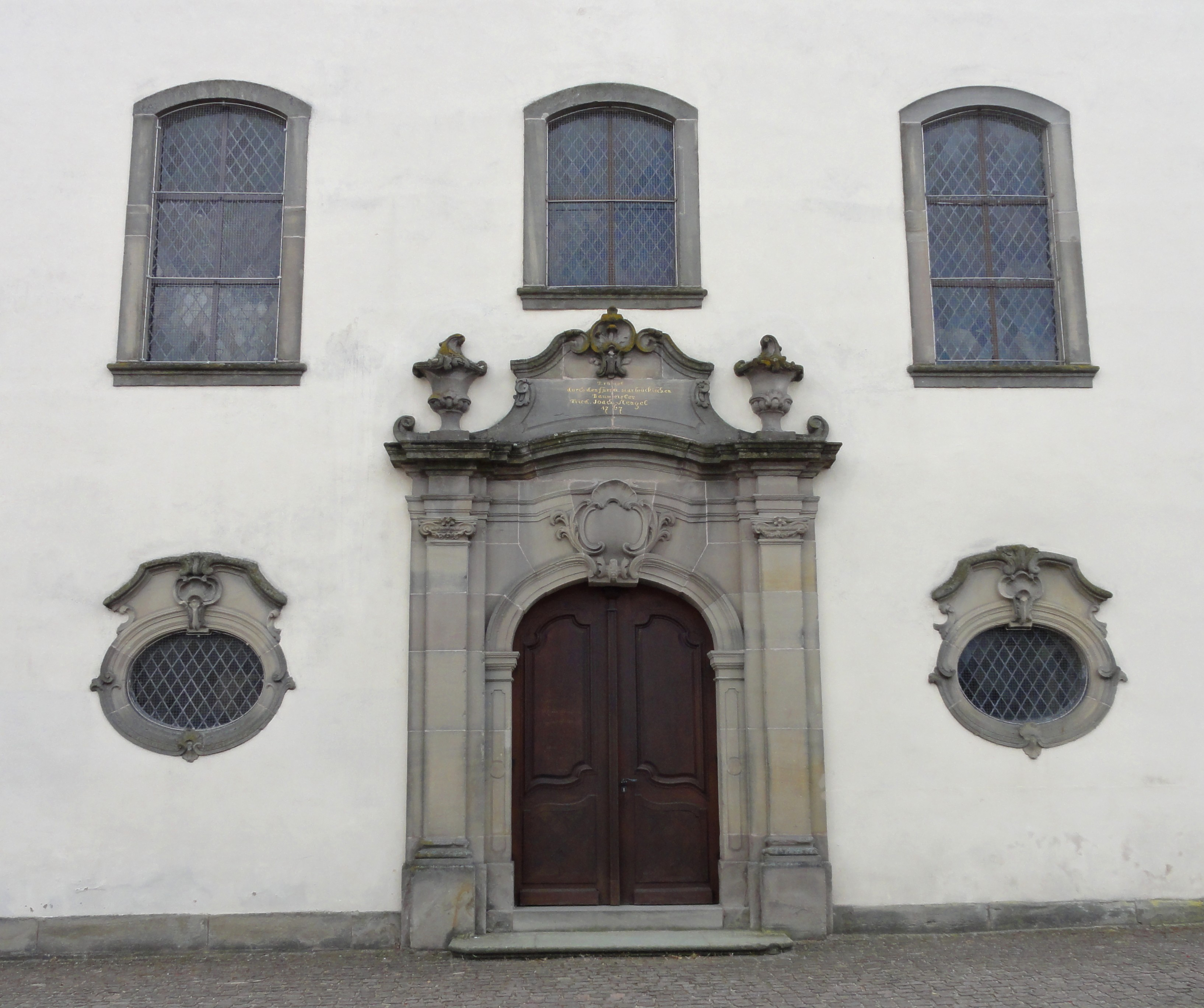 Alsace, Bas-Rhin, Église protestante de Harskirchen (PA00084744, IA67005797).